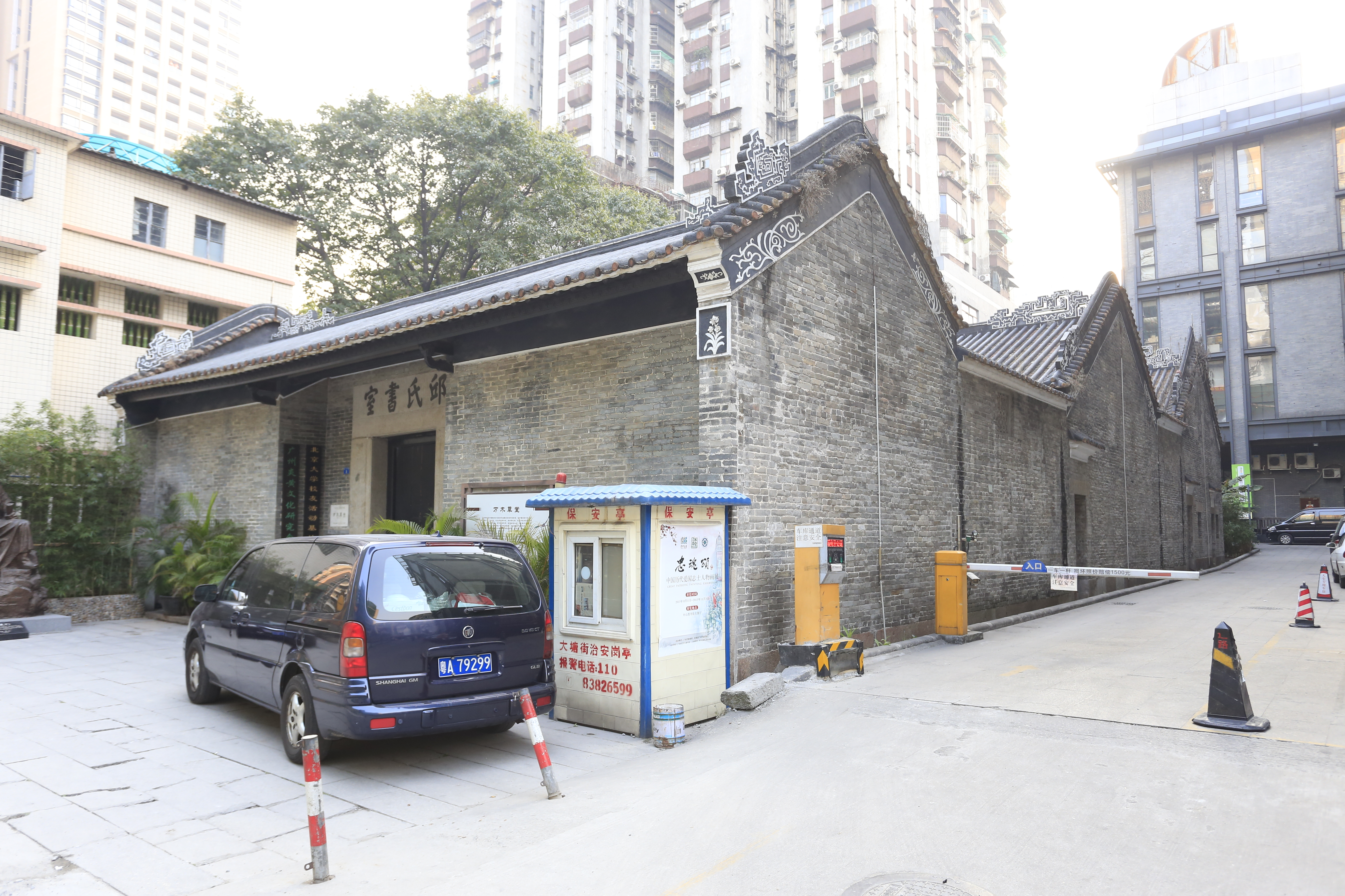 万木草堂